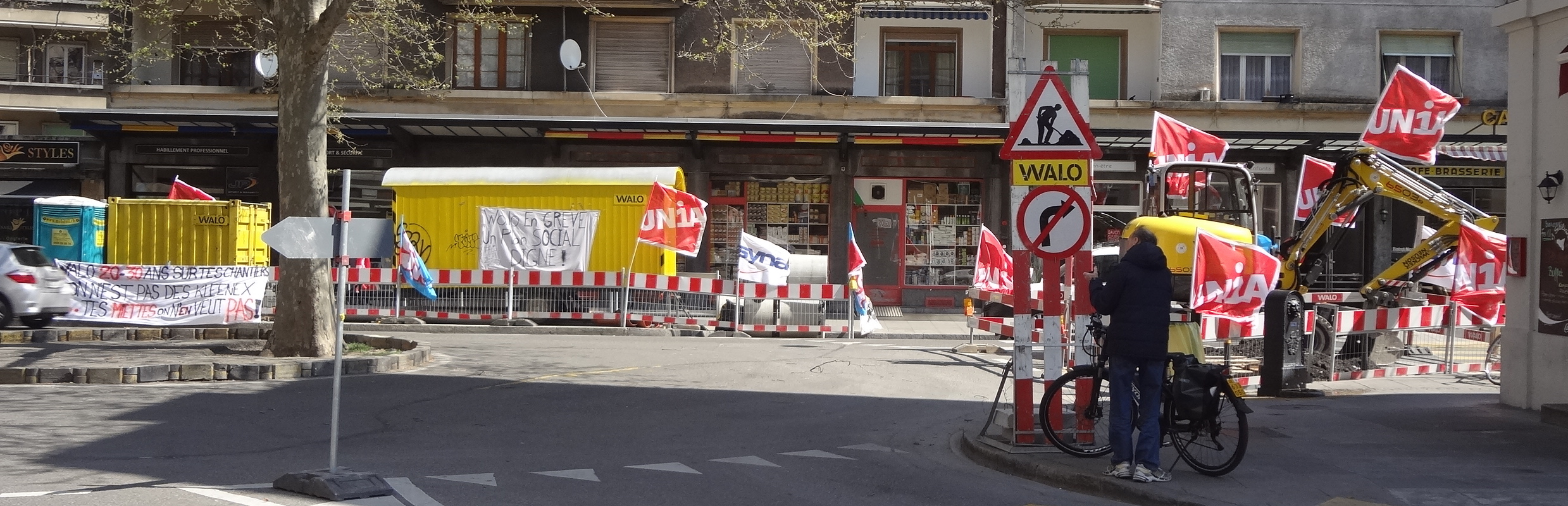 Grève des ouvriers de l'entreprise de construction « Walo » (2200 employés en Suisse) qui a annoncé la fermeture de sa succursale genevoise (40 employés). Les ouvriers sont en lutte pour un plan social. Rue de la Caroline